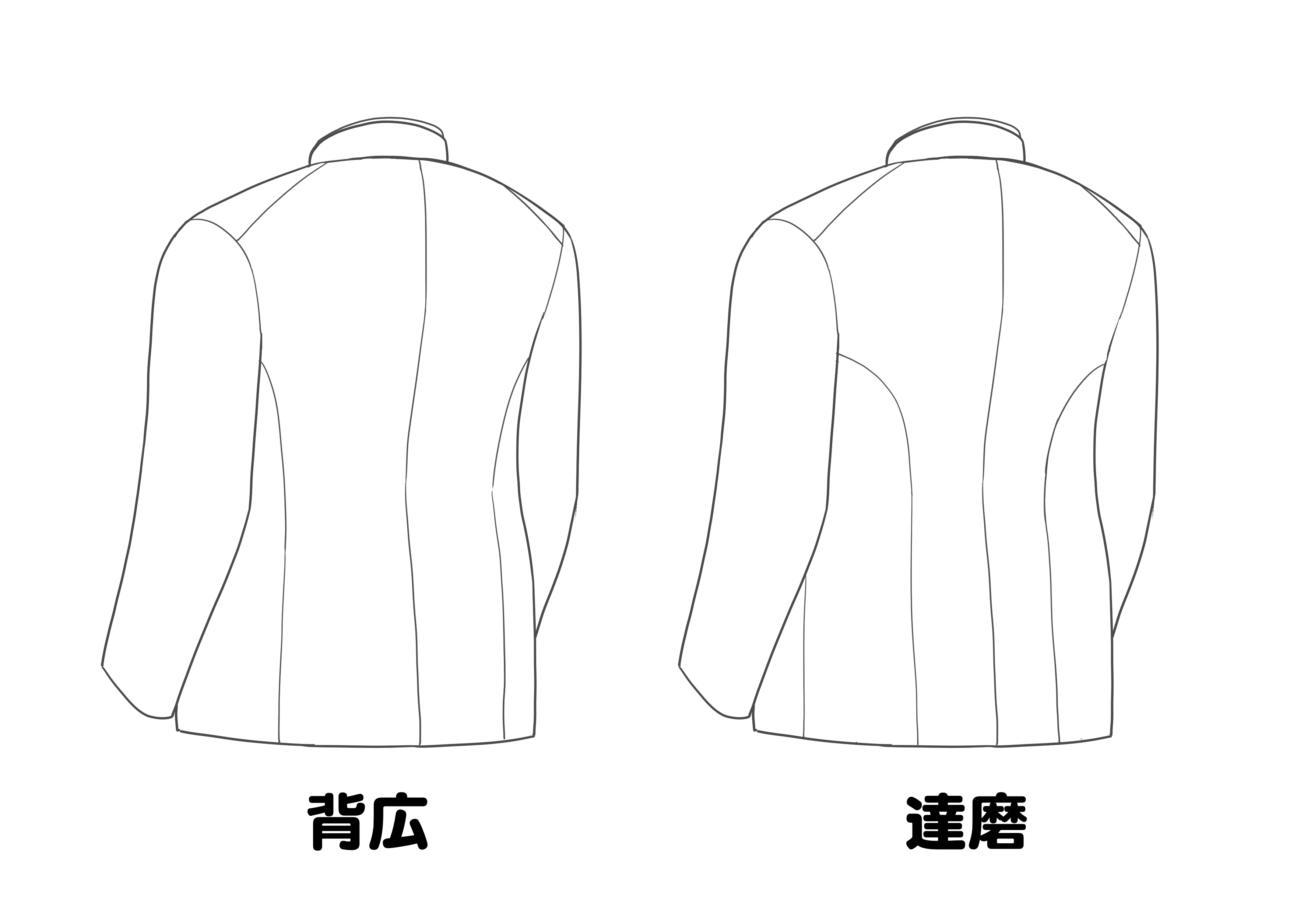 背広と達磨の違いを説明したもの